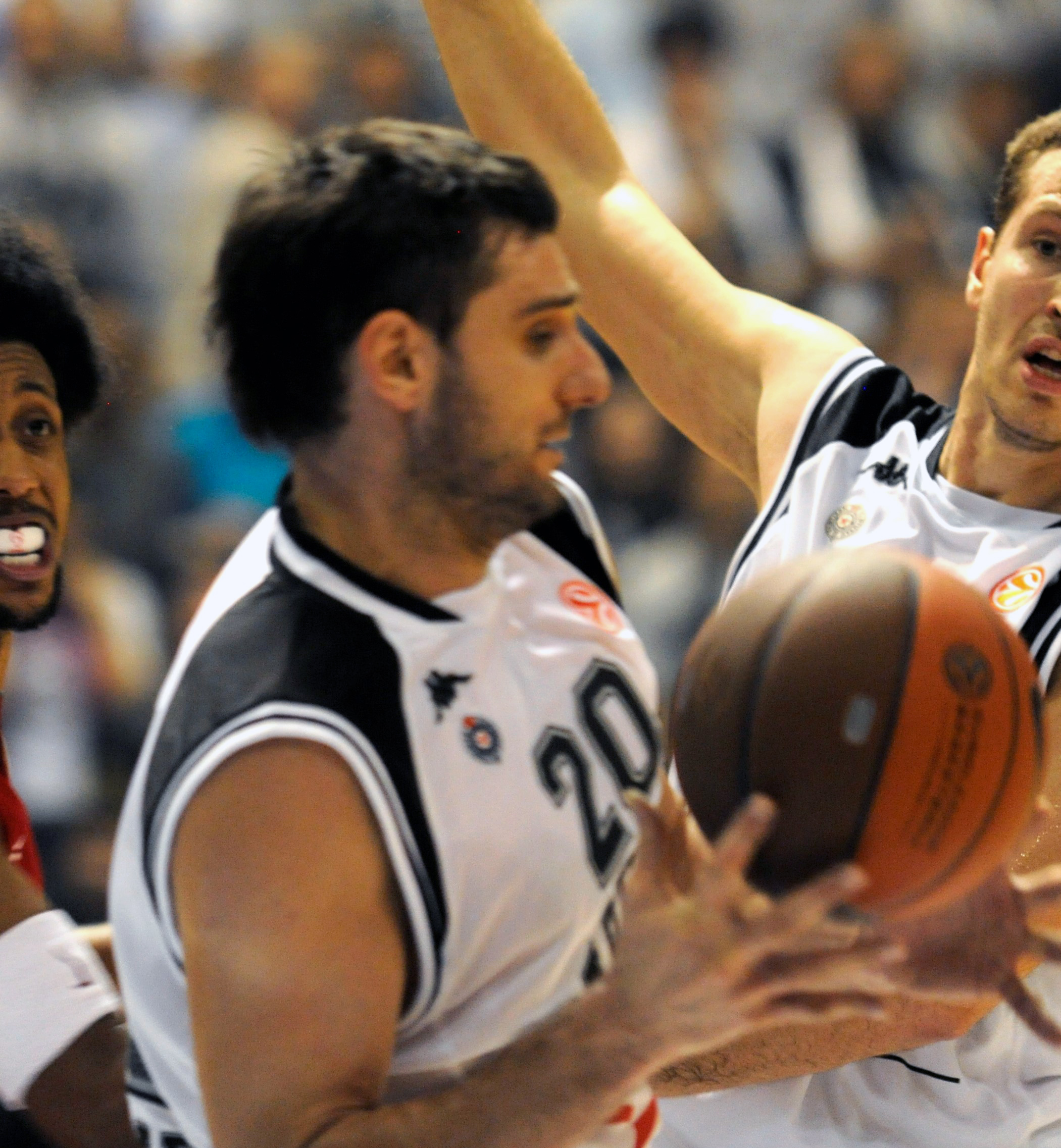 _DSC7085